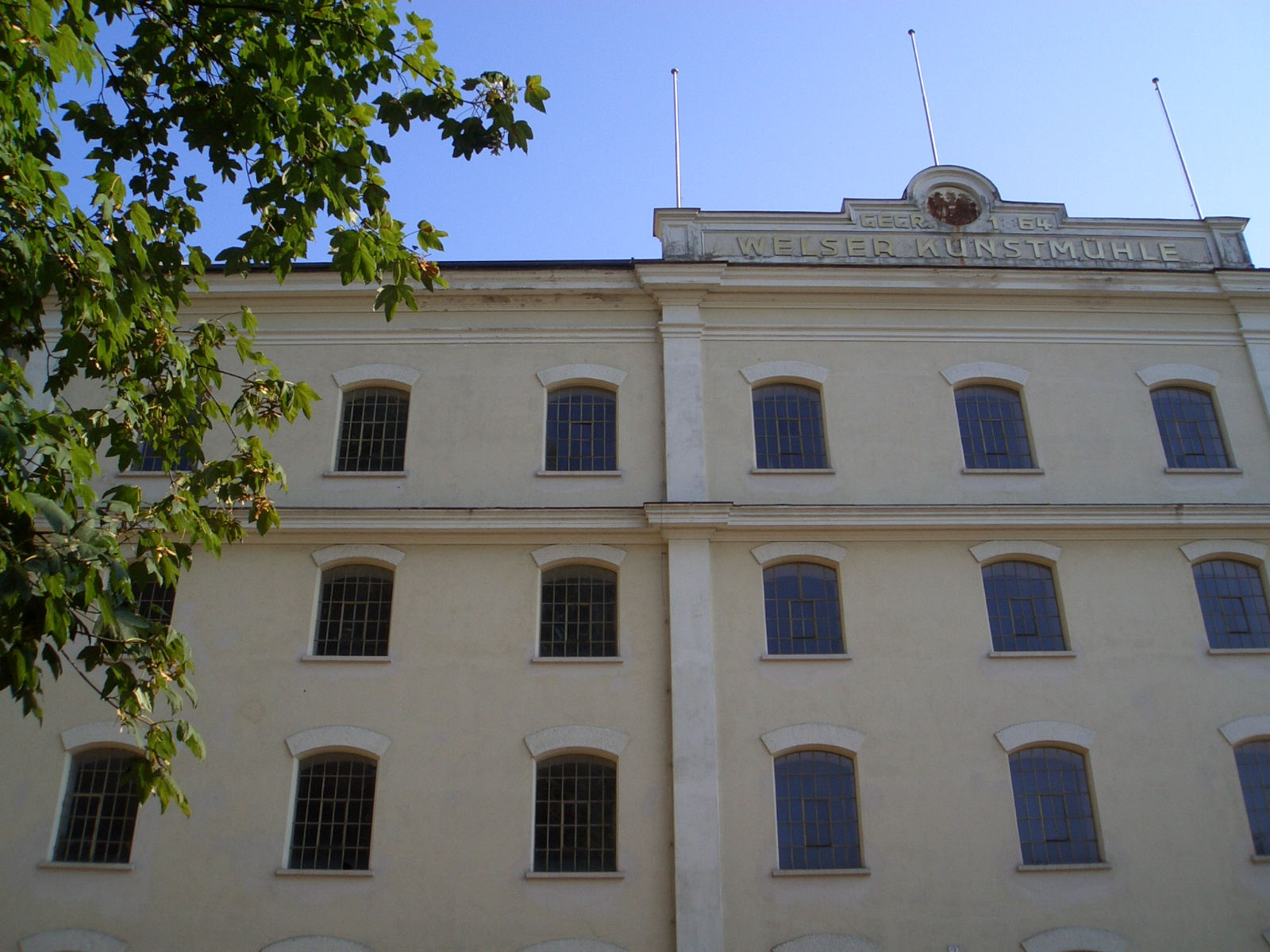 Welser Fritschmühle